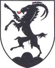 Wappen von Chevroux Kanton Waadt Schweiz